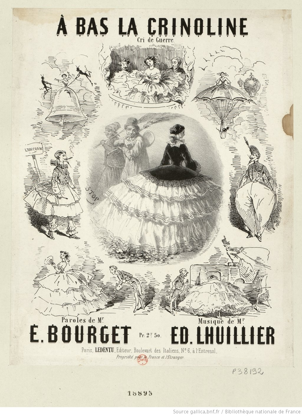 A bas la crinoline, paroles d'Ernets Bourget, musique d'Edmond Lhuillier.